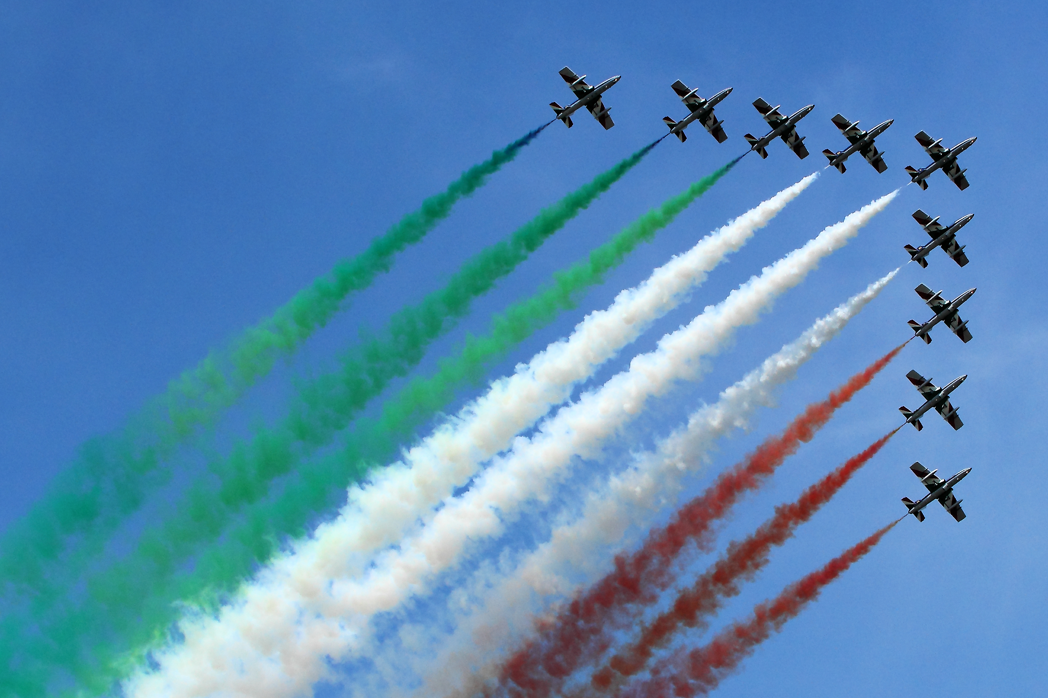 Frecce Tricolori - RIAT 2014